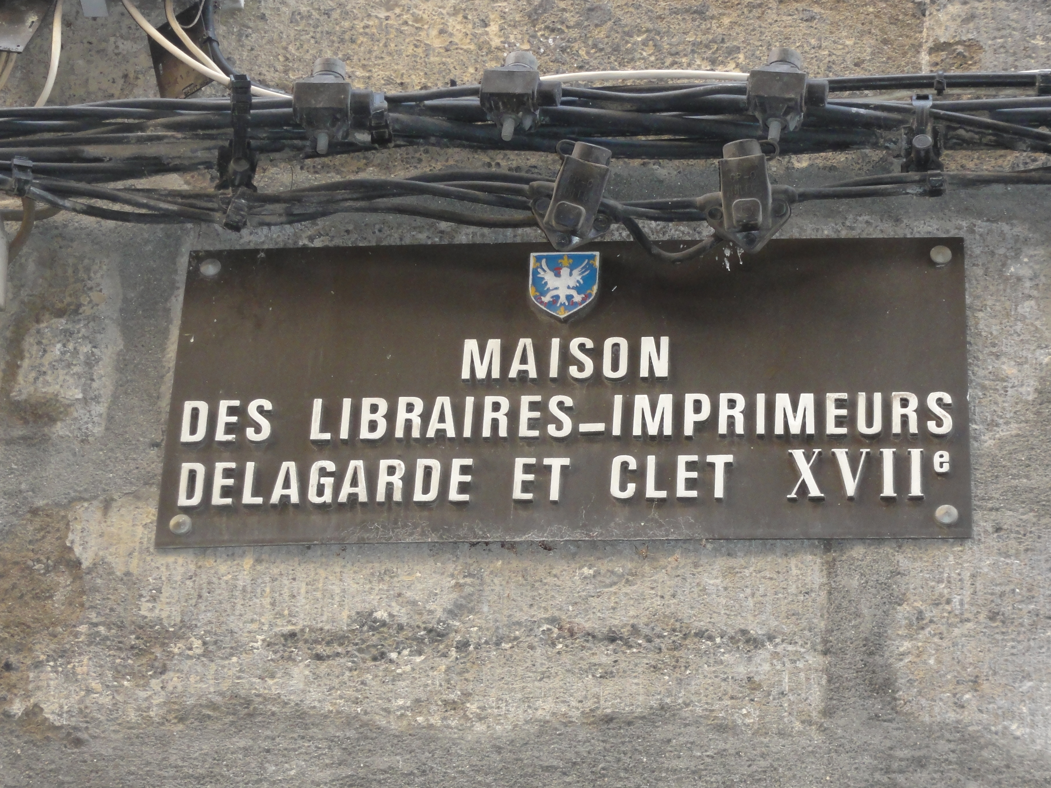 Plaque sur le logis d' Antoine Clet - Maître-imprimeur du 18eme siècle et écrivain